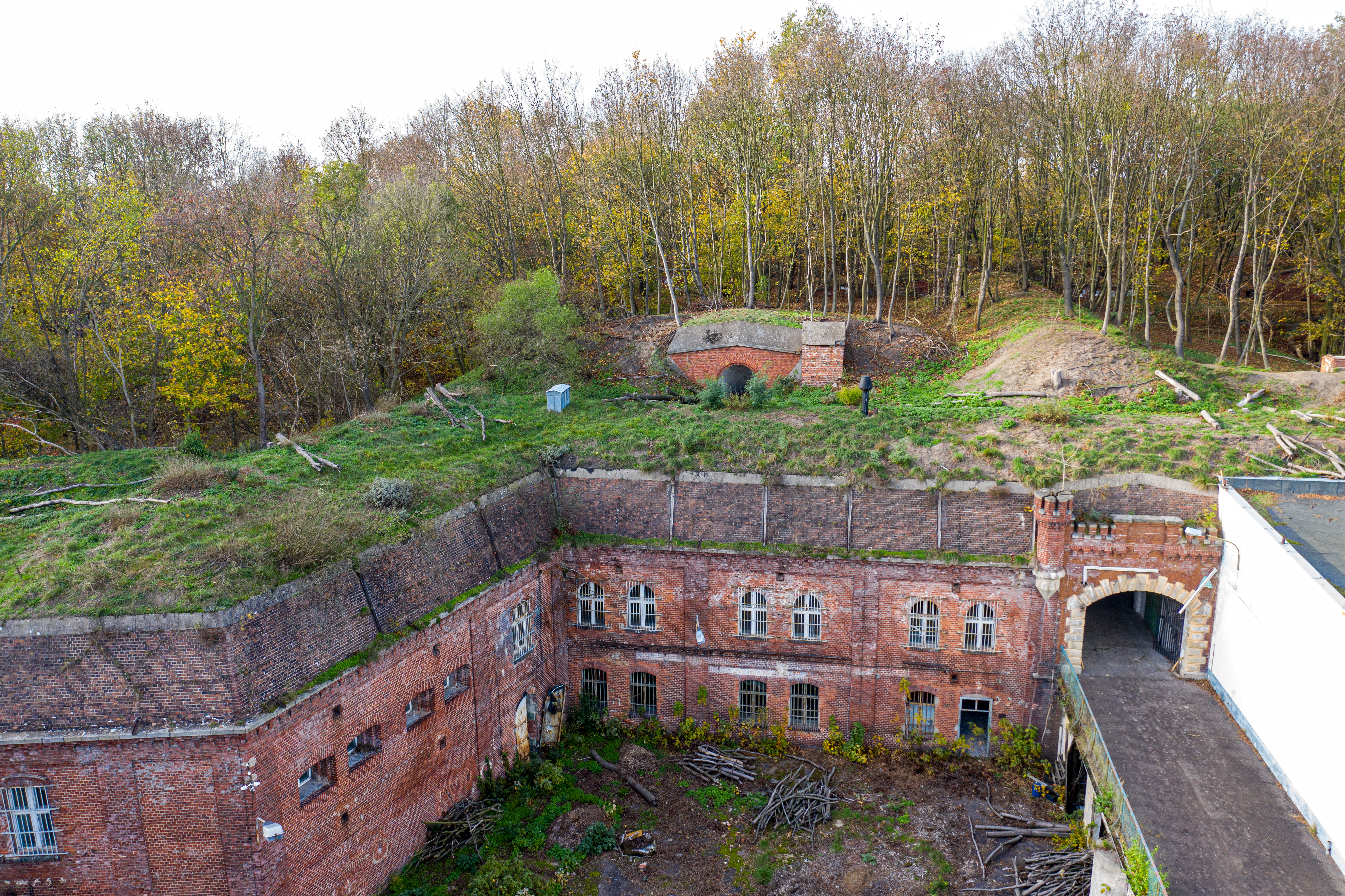 Festungsanlage Fort VII im Nordwesten von Torun, Okt. 2019